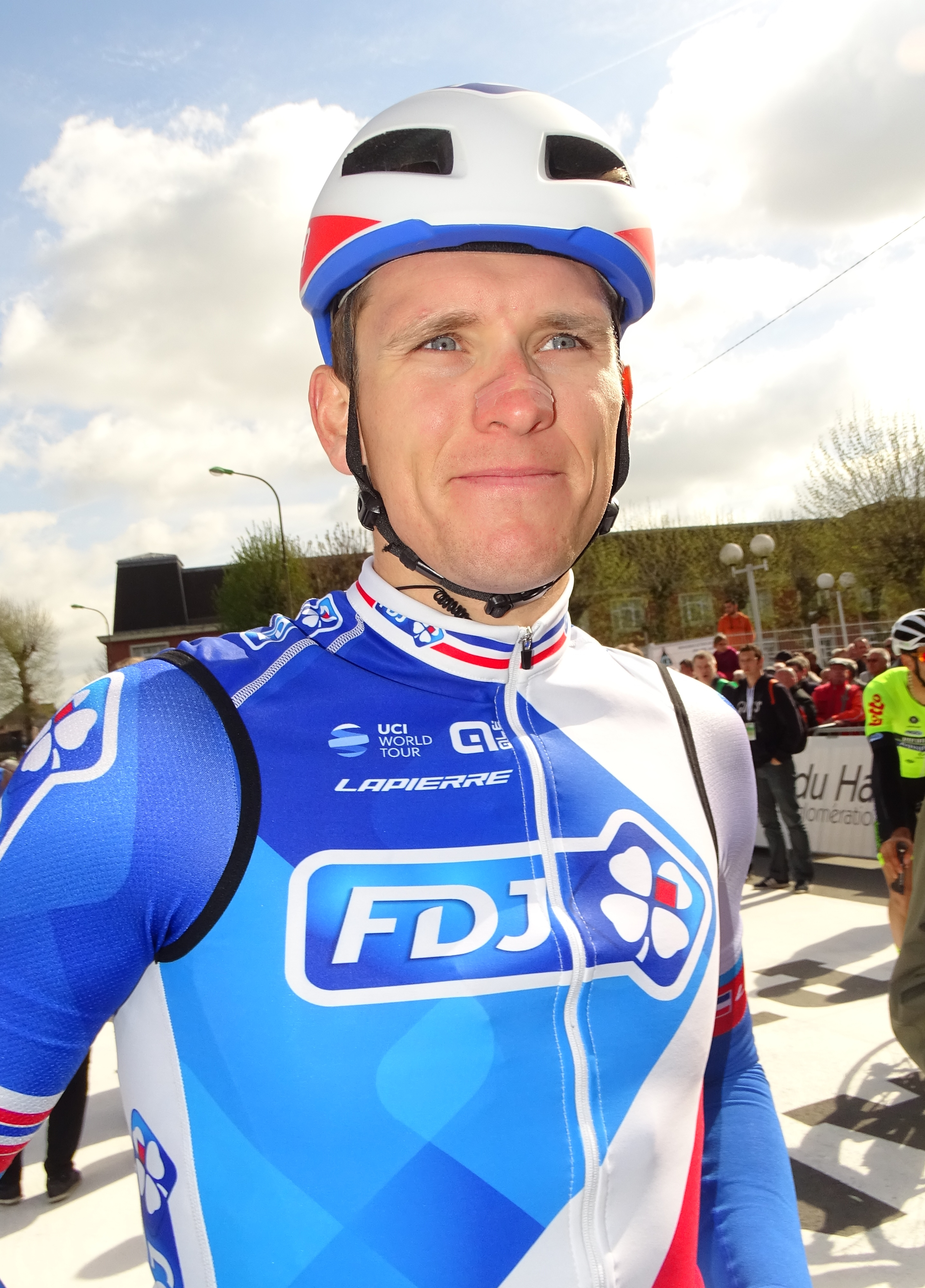 Reportage réalisé le jeudi 13 avril à l'occasion du départ et de l'arrivée du Grand Prix de Denain 2017 à Denain, Nord, Nord-Pas-de-Calais-Picardie, France.